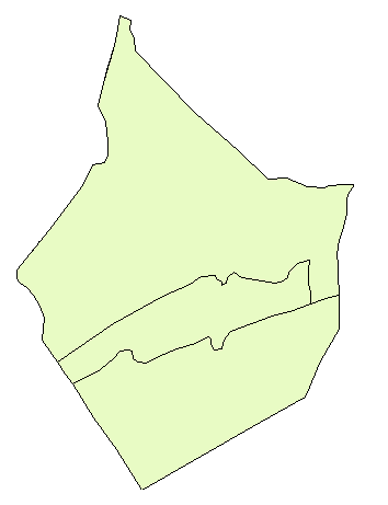 Blank map of Deir ez-Zor's districts.